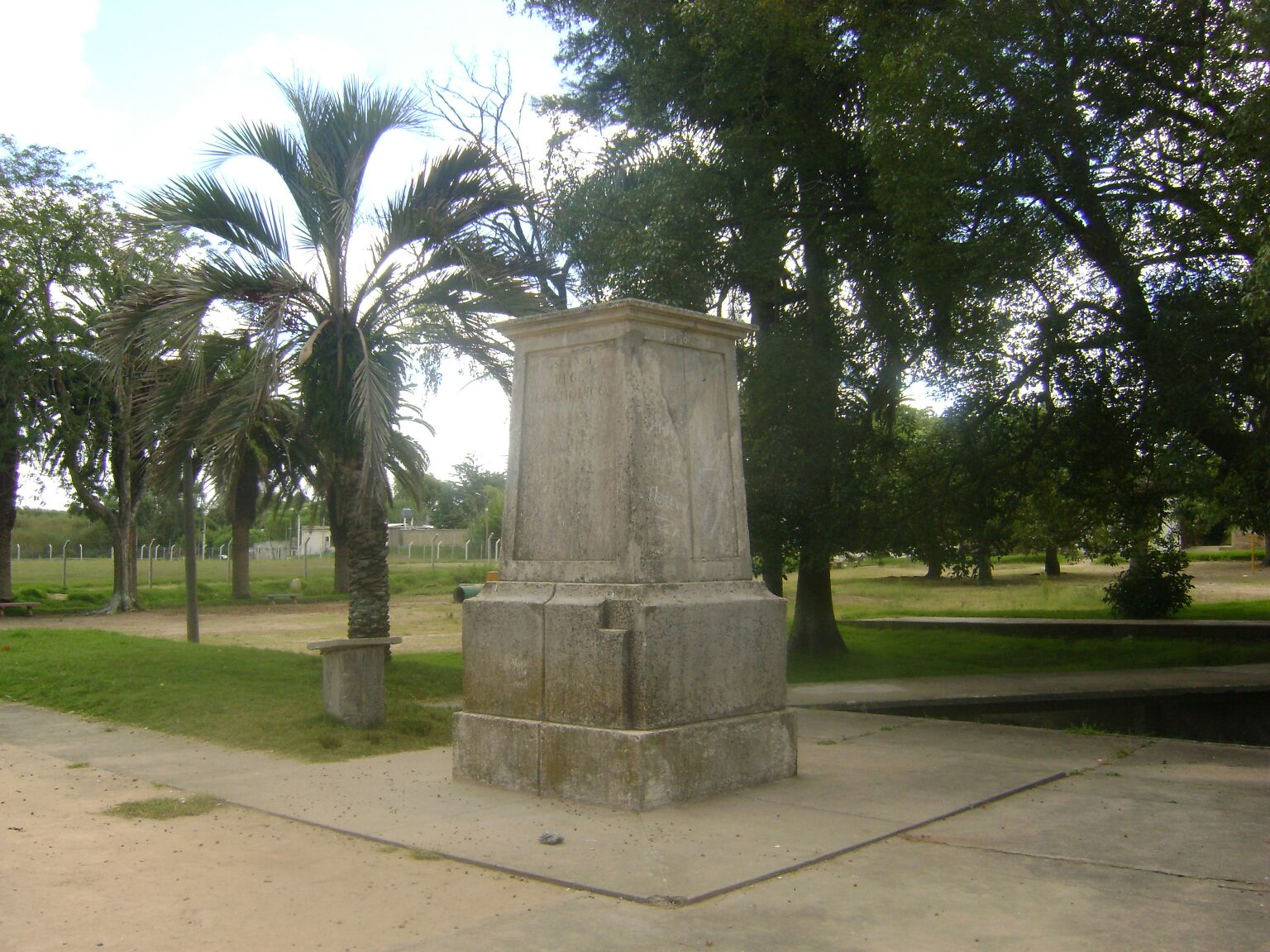 Marco de India Muerta. Rocha.